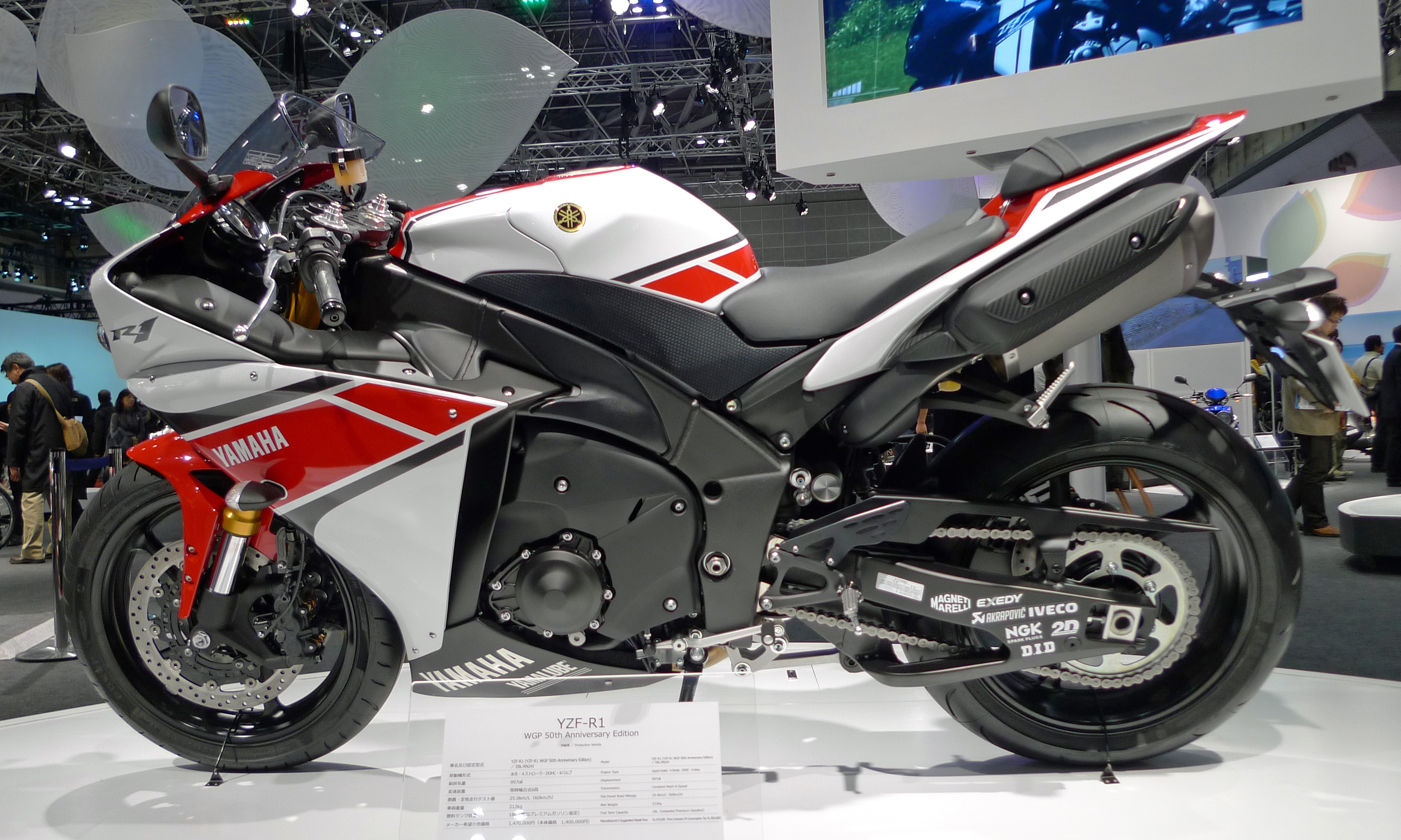 ヤマハYZF-R1 2012年モデル 東京モーターショー2011にて撮影